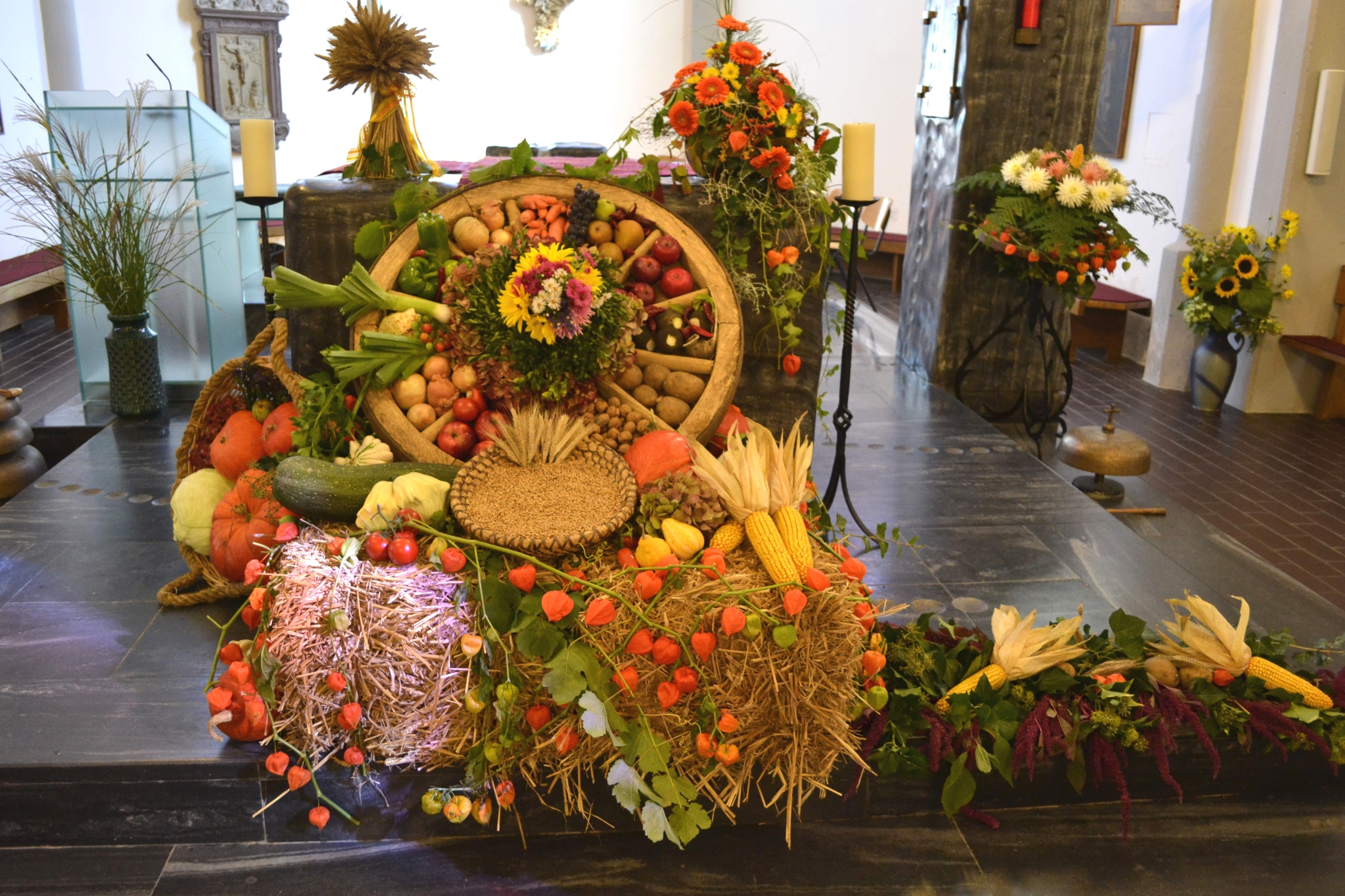 Dekoration zum Erntedankfest in der Pfarrkirche hl. Georg in Wernstein am Inn in Oberösterreich.